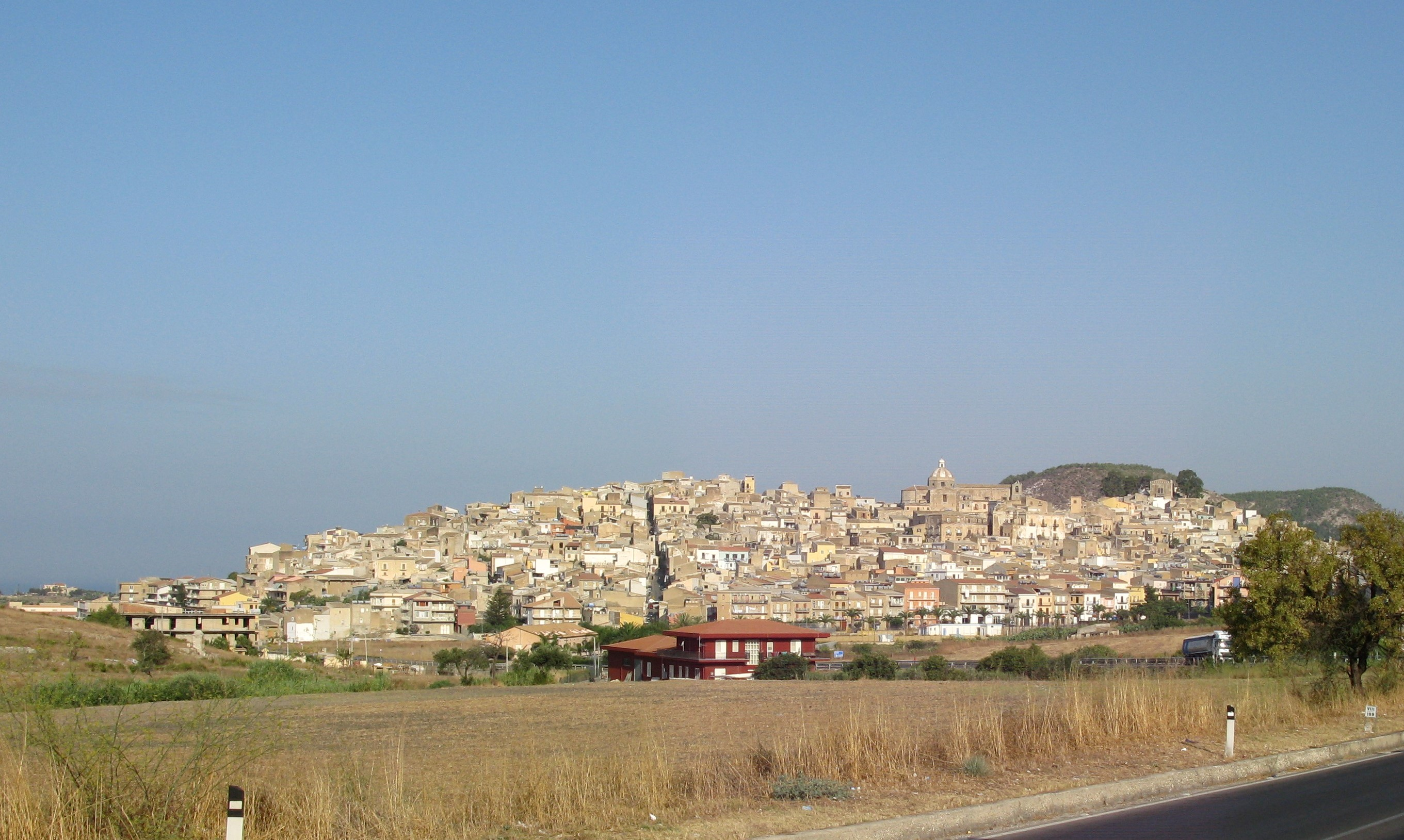 Panorama di Siculiana.